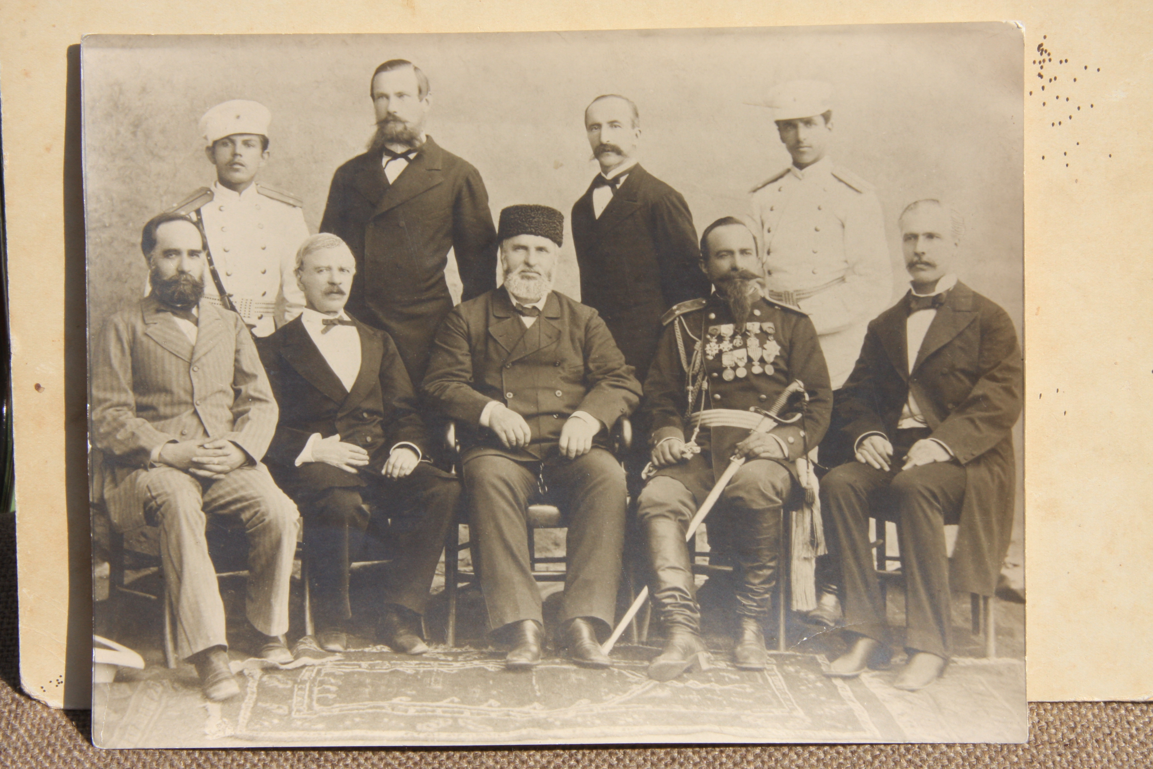 Първият Директорат на Източна Румелия, Пловдив, 1879. Седнали: 1. Йоаким Груев, директор на народното просвещение и вероизповеданията, 2. Гаврил Кръстевич, главен секретар и директор на вътрешните дела, 3. Александър Богориди, генерал-губернатор, генерал Виктор Виталис, началник на милицията и жандармерията, 5. Тодор Кесяков, директор на правосъдието, Прави: Неизвестен руски офицер, 2. д-р Адолф Шмит, директор на финансите, 3. Георги Вълкович, директор на земеделието търговията и общите сгради 4. неизвестен руски офицер.